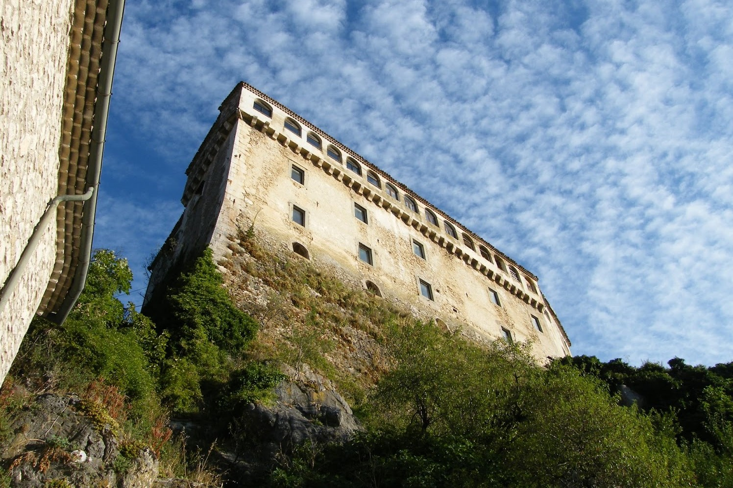 Visto dalla chiesa